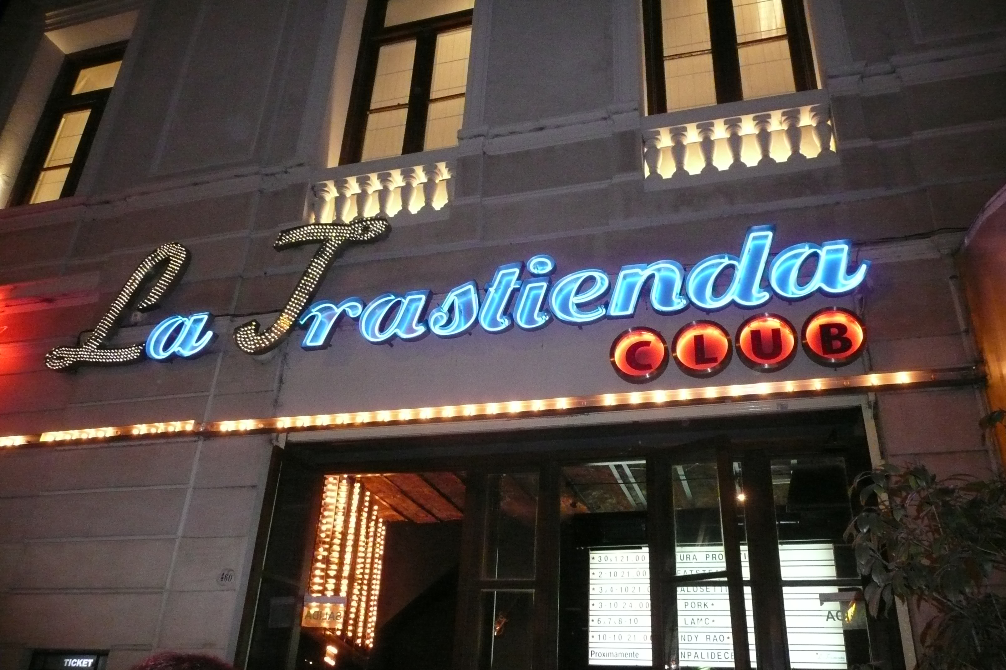 La Trastienda Club. 460 Balcarce St. - Buenos Aires.